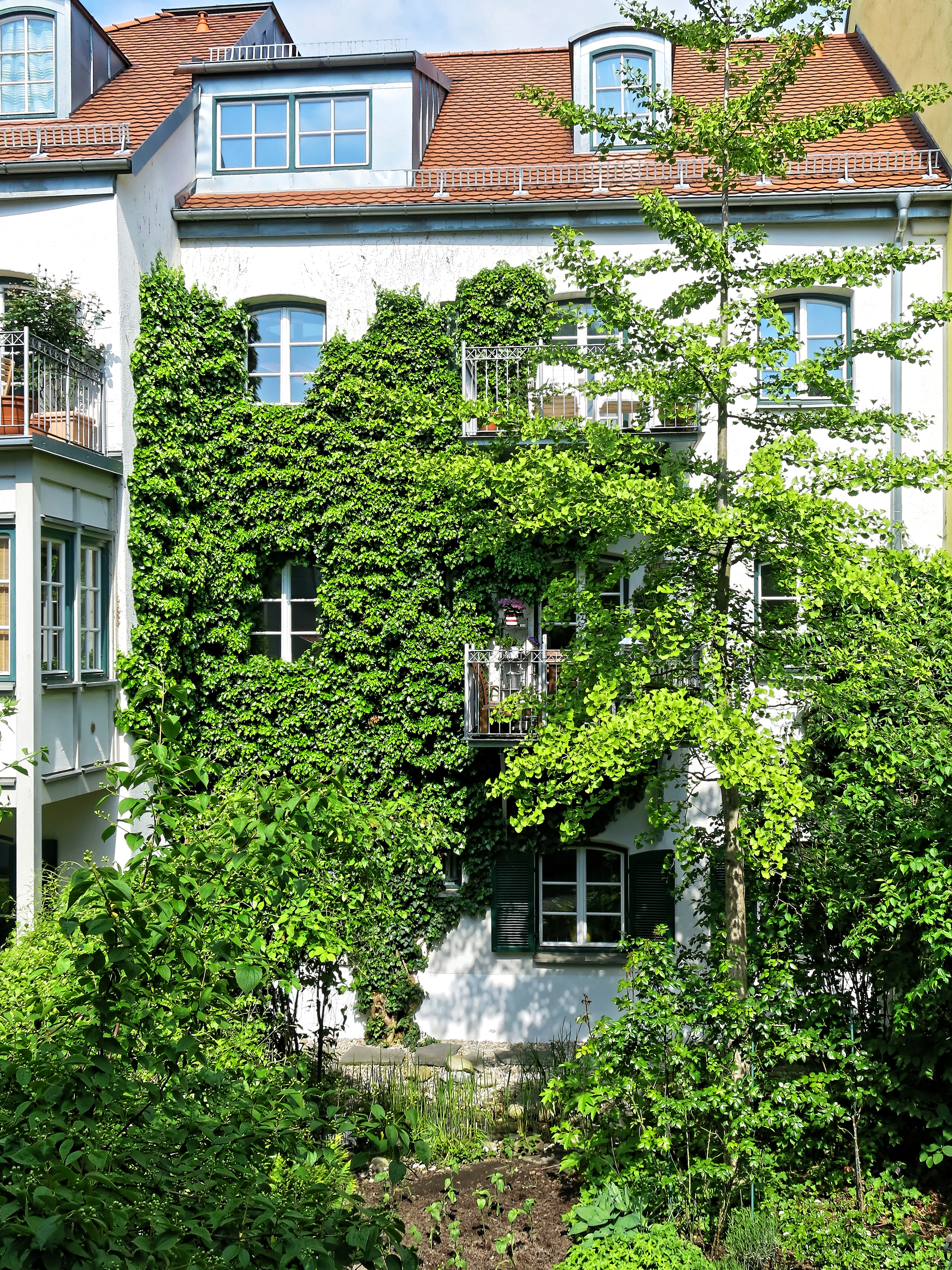 eingegrünte Front der Rückseite des Valentinhauses, rechts im Bild Gingko biloba, die Fassade ist mit Efeu bedeckt